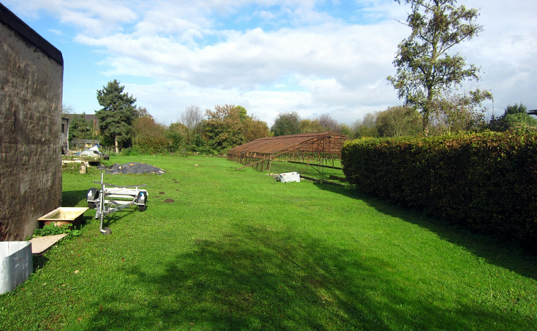 Blick von außen auf den Bereich zwischen den Straßen 'Hinter der Papenburg' und 'Klever Straße' in Krefeld-Hüls, aufgenommen von der Straße 'Fette Henn' aus (2014). Im Bereich links der Bildmitte befand sich einst der alte jüdische Friedhof im "Meyser Feld".